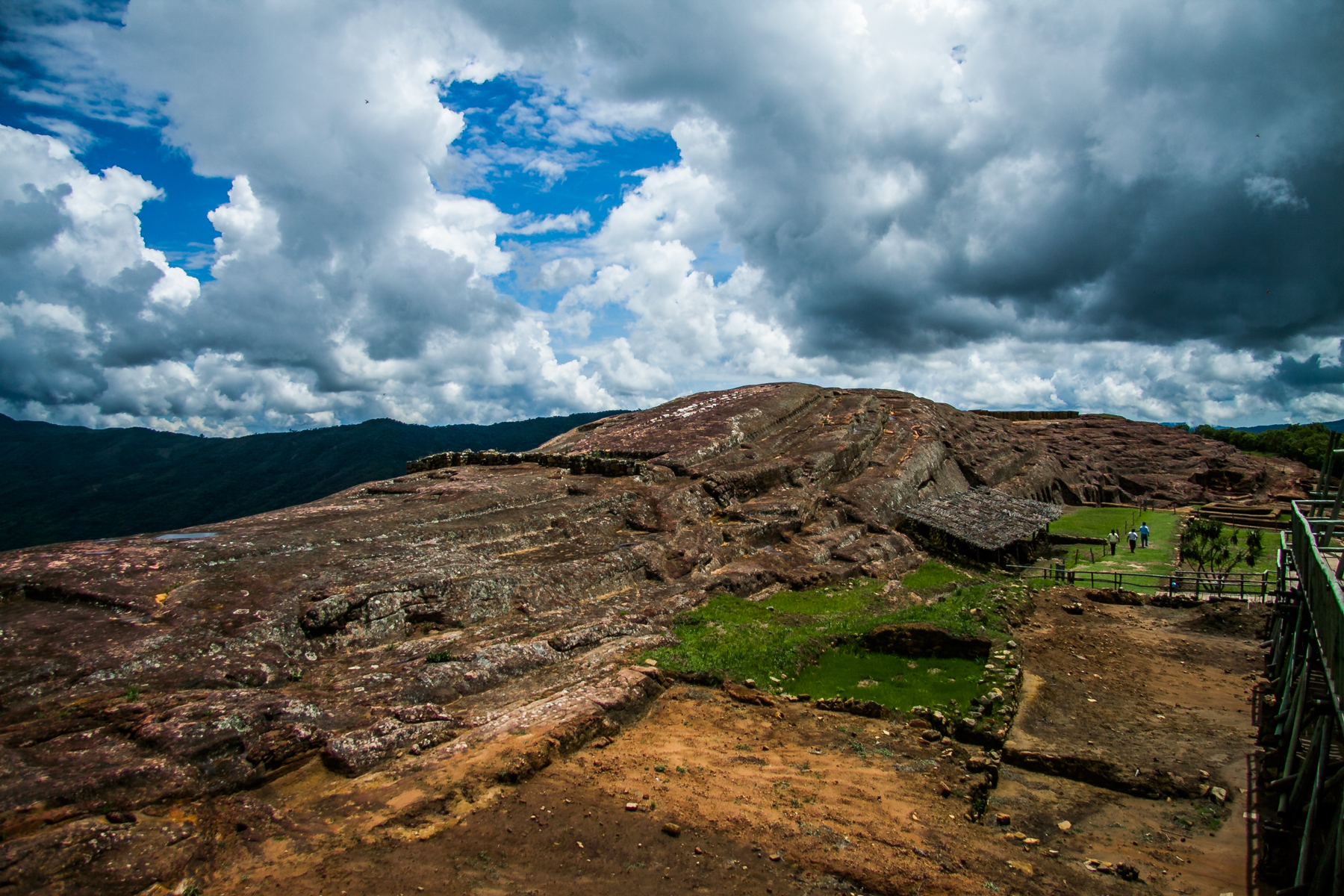 Fuerte de Samaipata This medium shows the protected monument with the number S/00-037 in Bolivia.